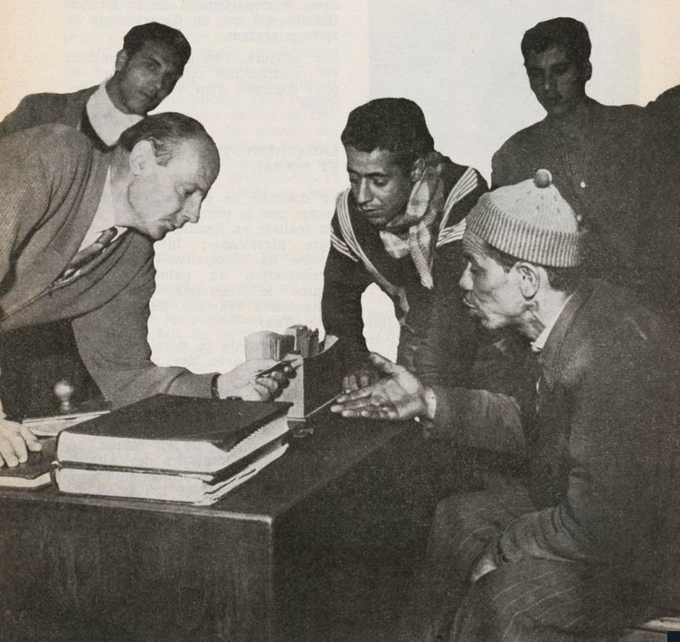 Immigrés algériens, 1969. Informations sociales : bulletin mensuel à l'usage des services sociaux / Union nationale des caisses d'allocations familiales, 1969.